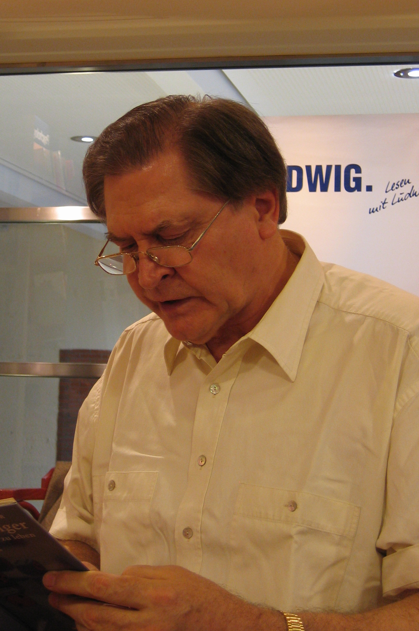 Der Schriftsteller Wolfgang Bittner bei einer Lesung